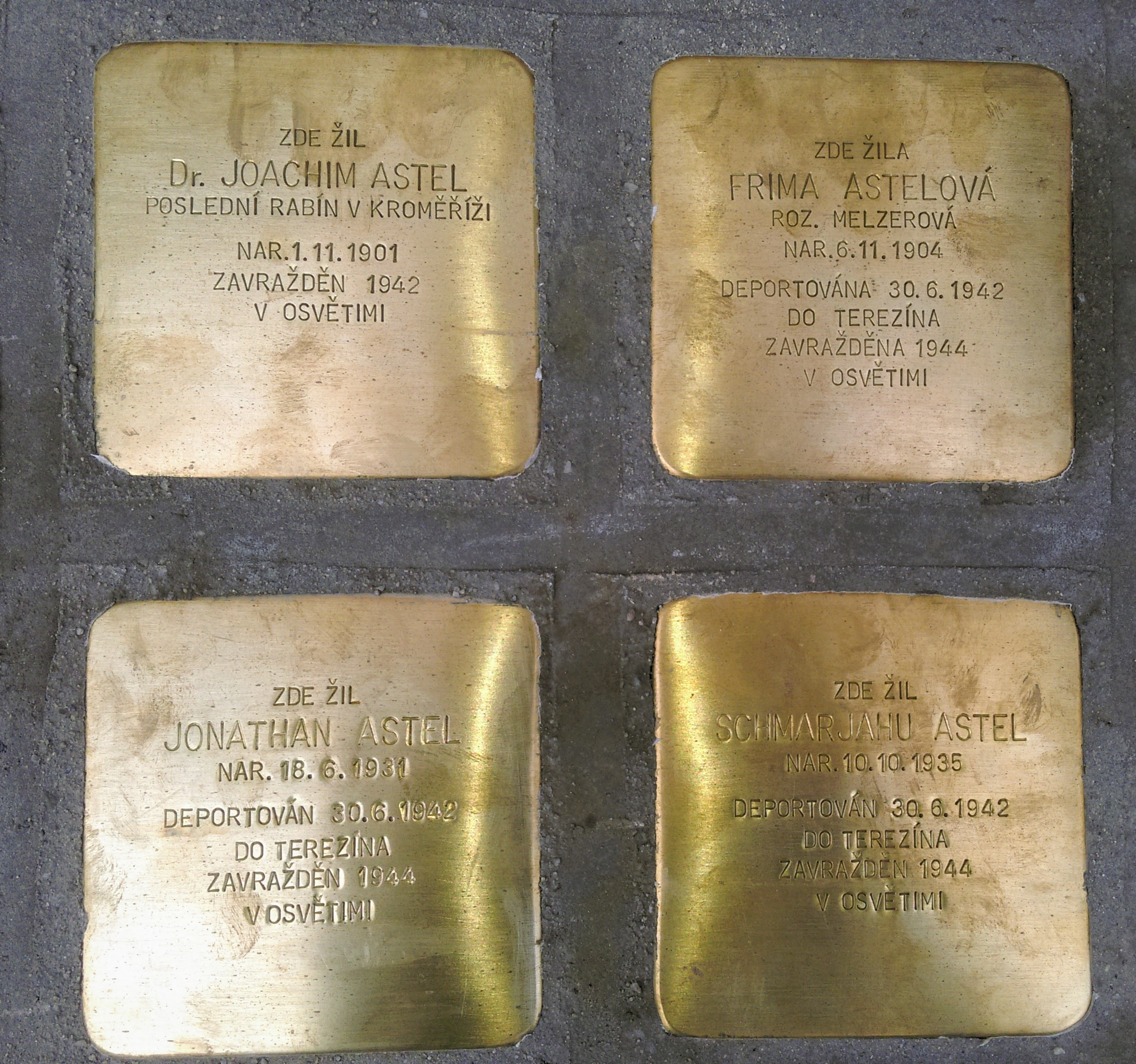 Stolpersteine in Kroměříž - Joachim Astel, Frima Astel, Jonathan Astel , Schmarjahu Astel